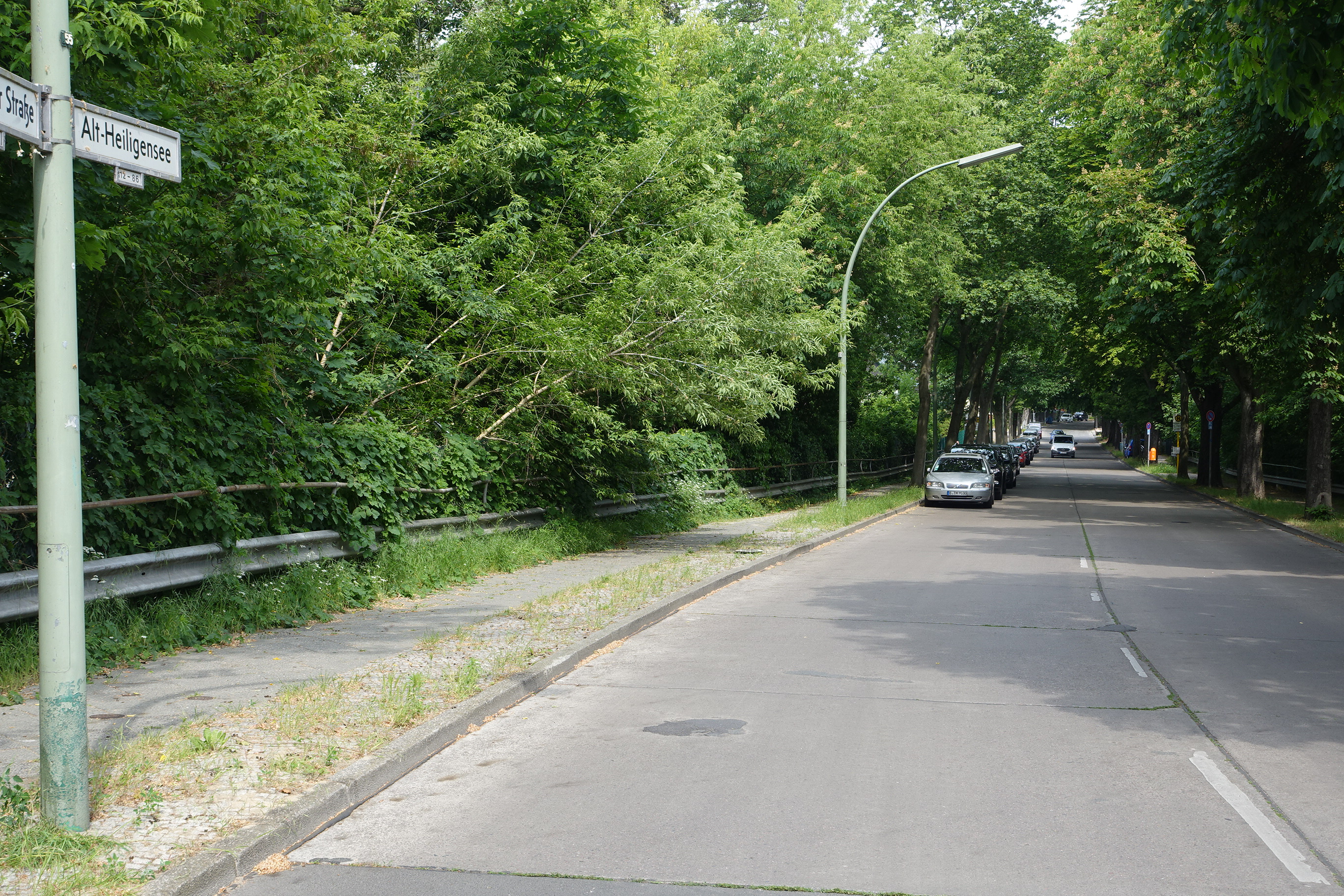 Straßenpanorama